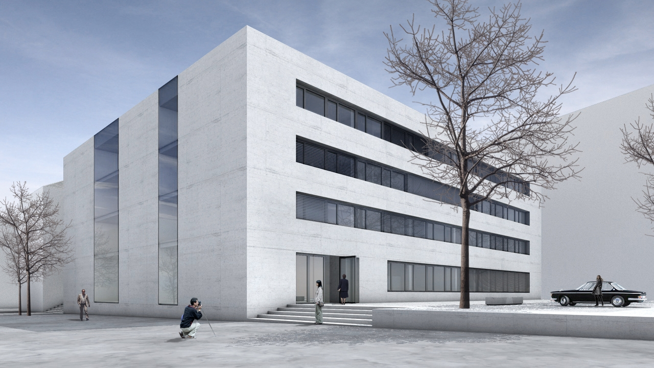 Neubau HFT Stuttgart